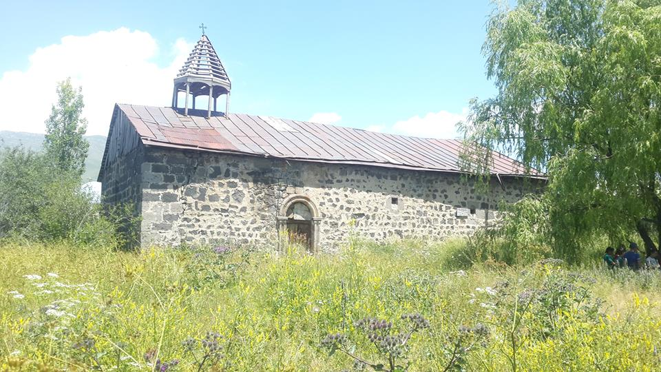 19 դ. եկեղեցի Զովաբեր գյուղում